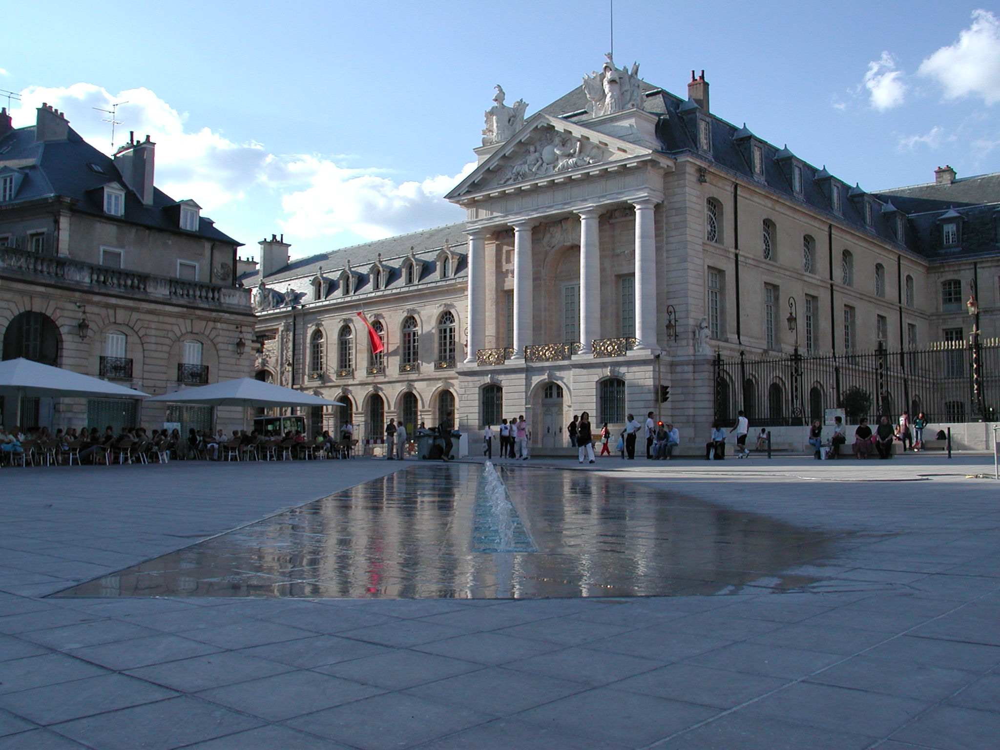 Digione, France, palazzo e piazza ducale